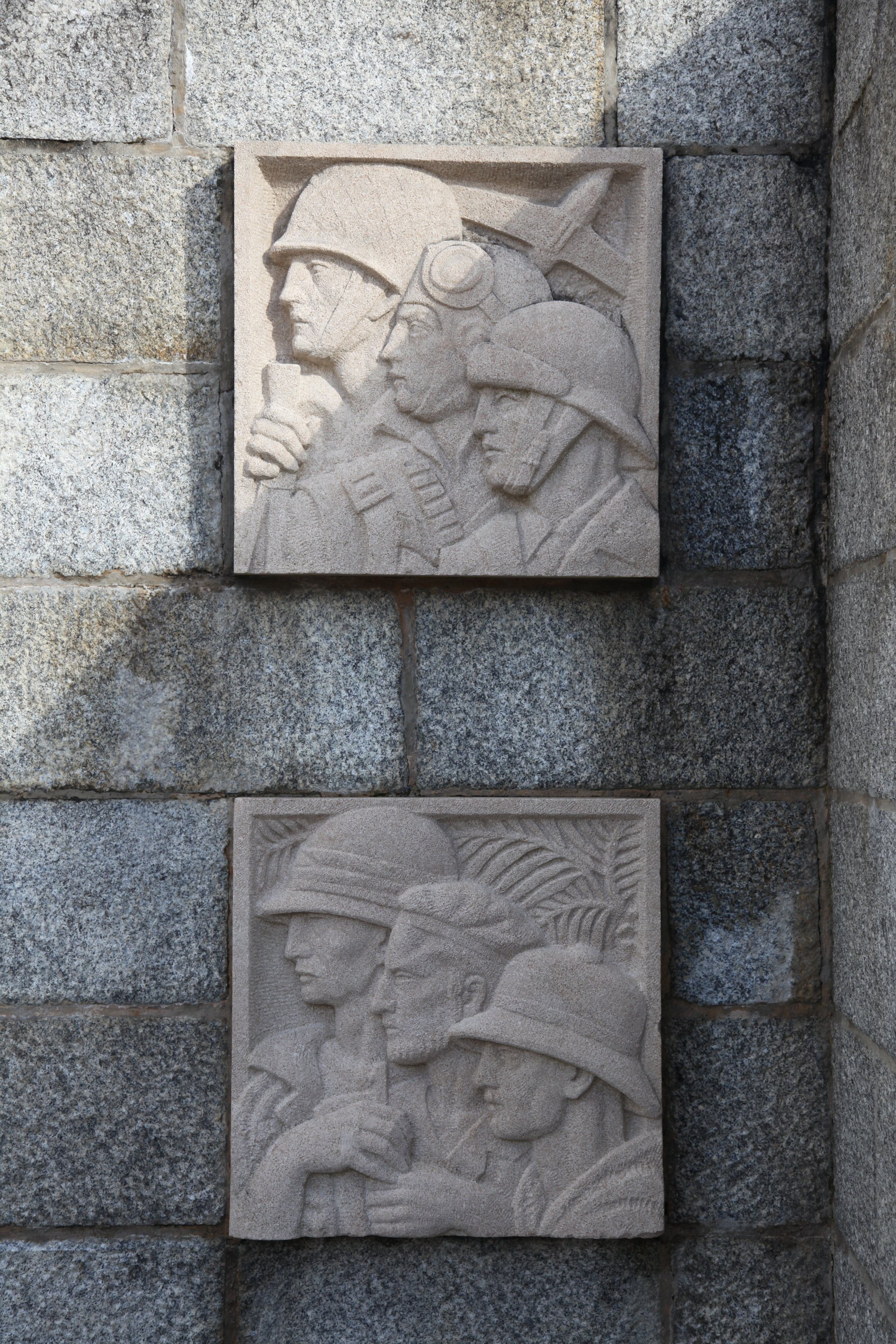 Brest Place de la Liberté Monument aux morts détail droit